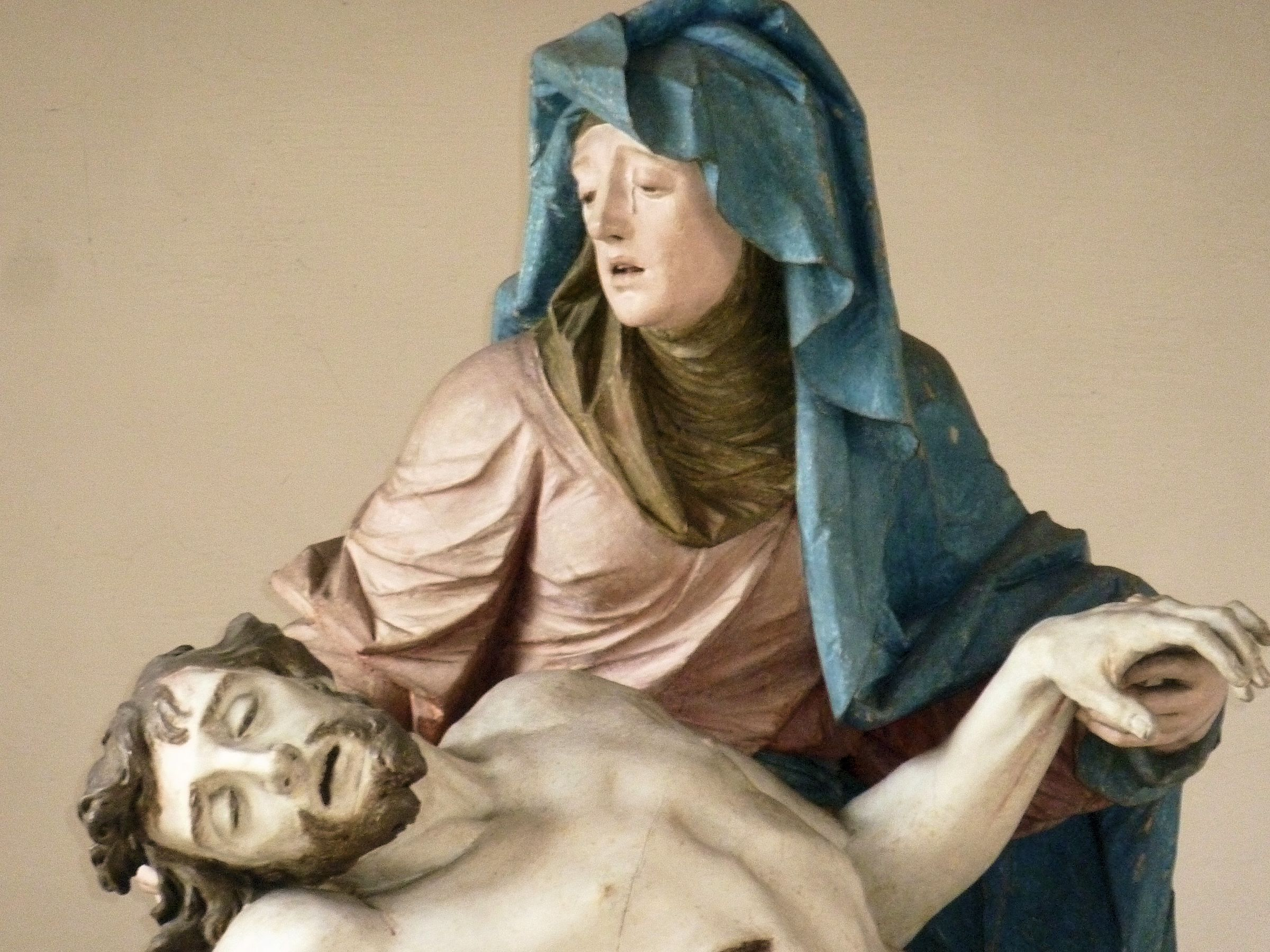 Nenninger Pietà von 1774, letztes Werk von Ignaz Franz Günther